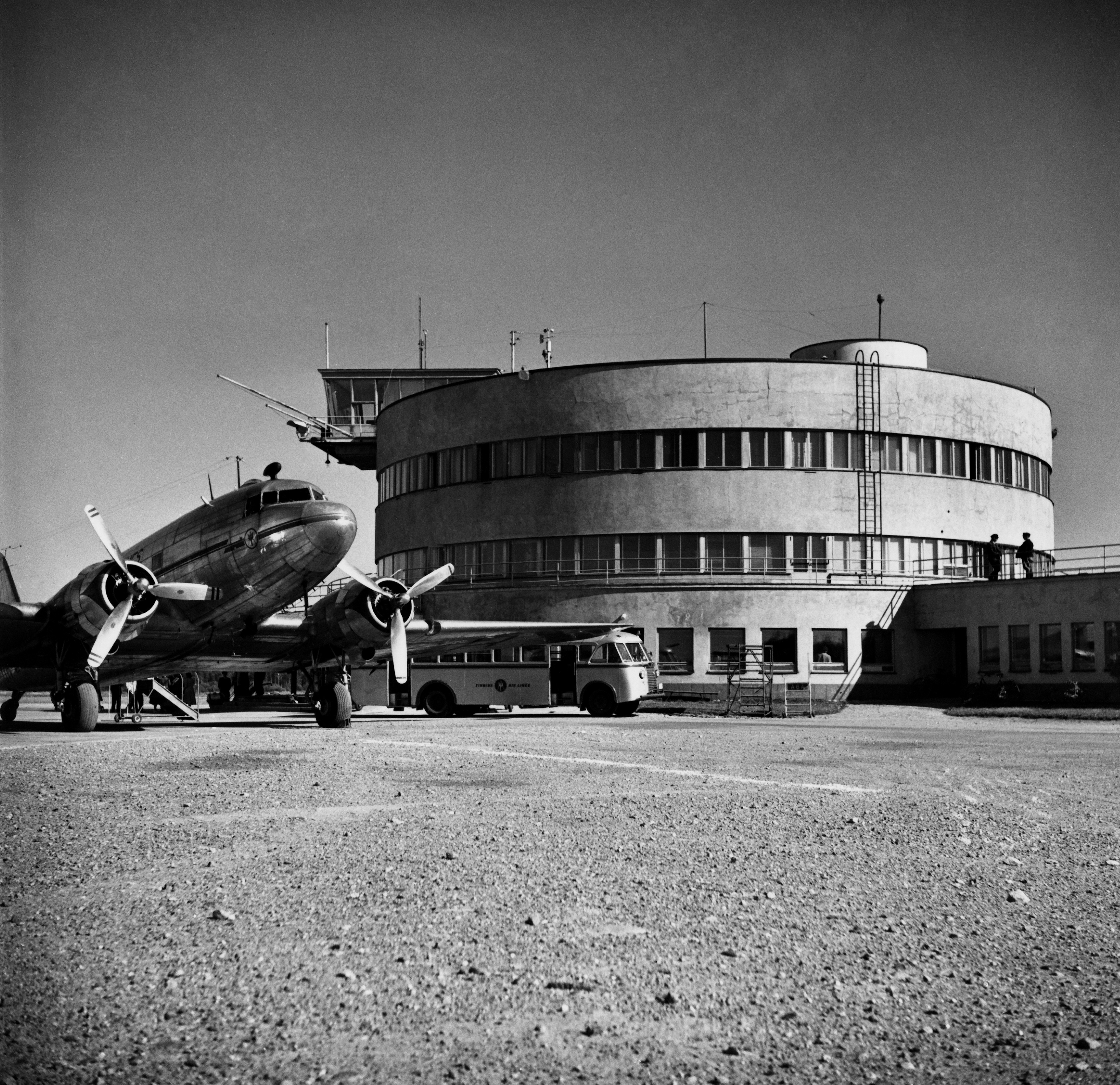 Helsingin lentoasema (Helsinki-Malmin lentoasema) noin vuonna 1949.